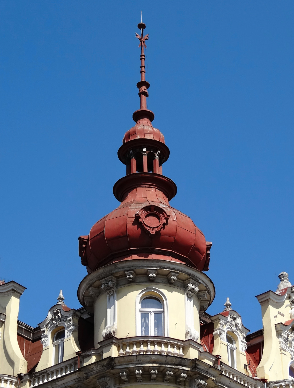 Kamienica Plac Wolności 1 w Bydgoszczy, róg ul. Gdańskiej (1898, aut. Józef Święcicki)